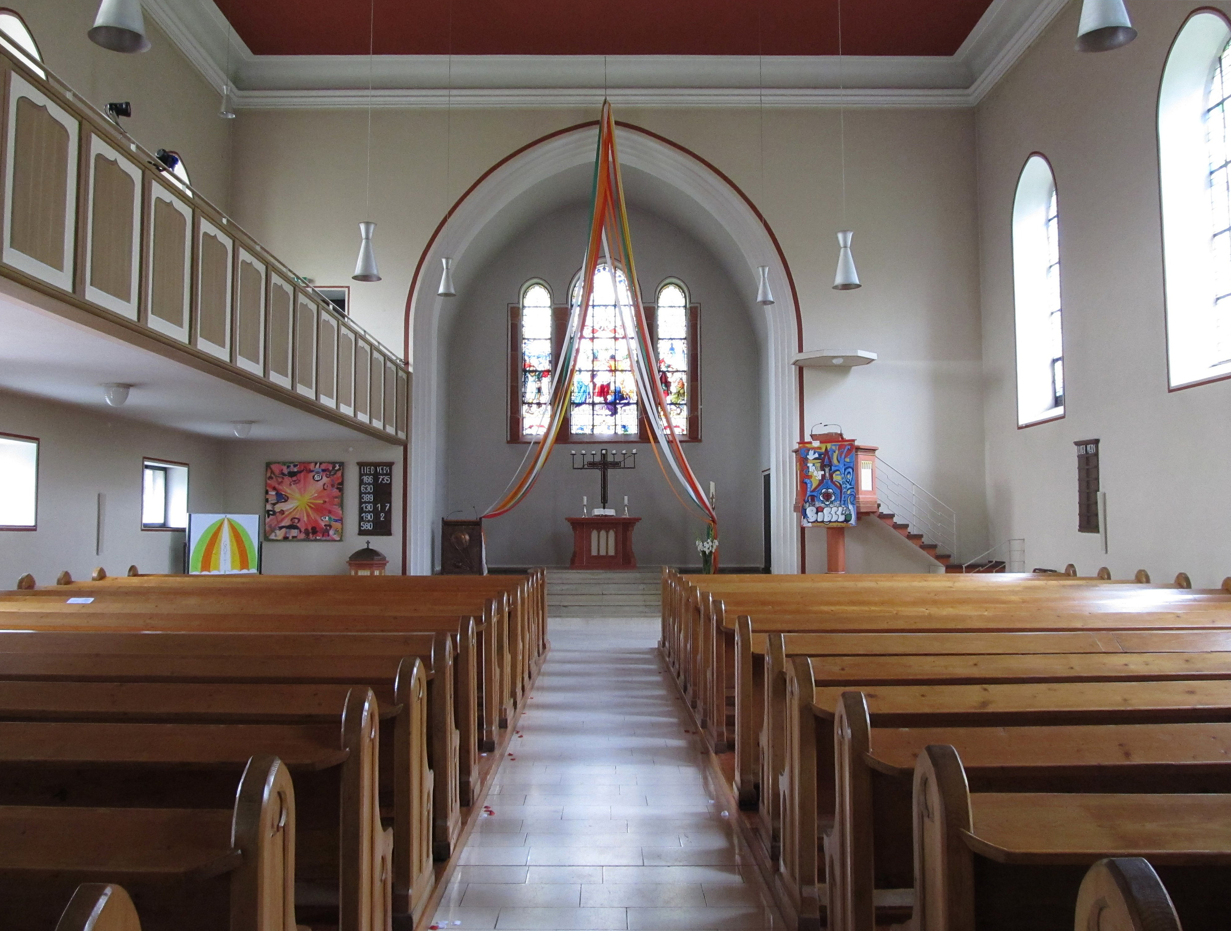 Blick ins Innere der protestantischen Martin-Luther-Kirche in St. Ingbert, Saarland